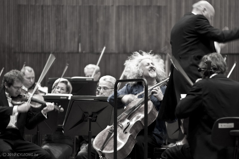 Russisch cellobespeler Mischa Maisky